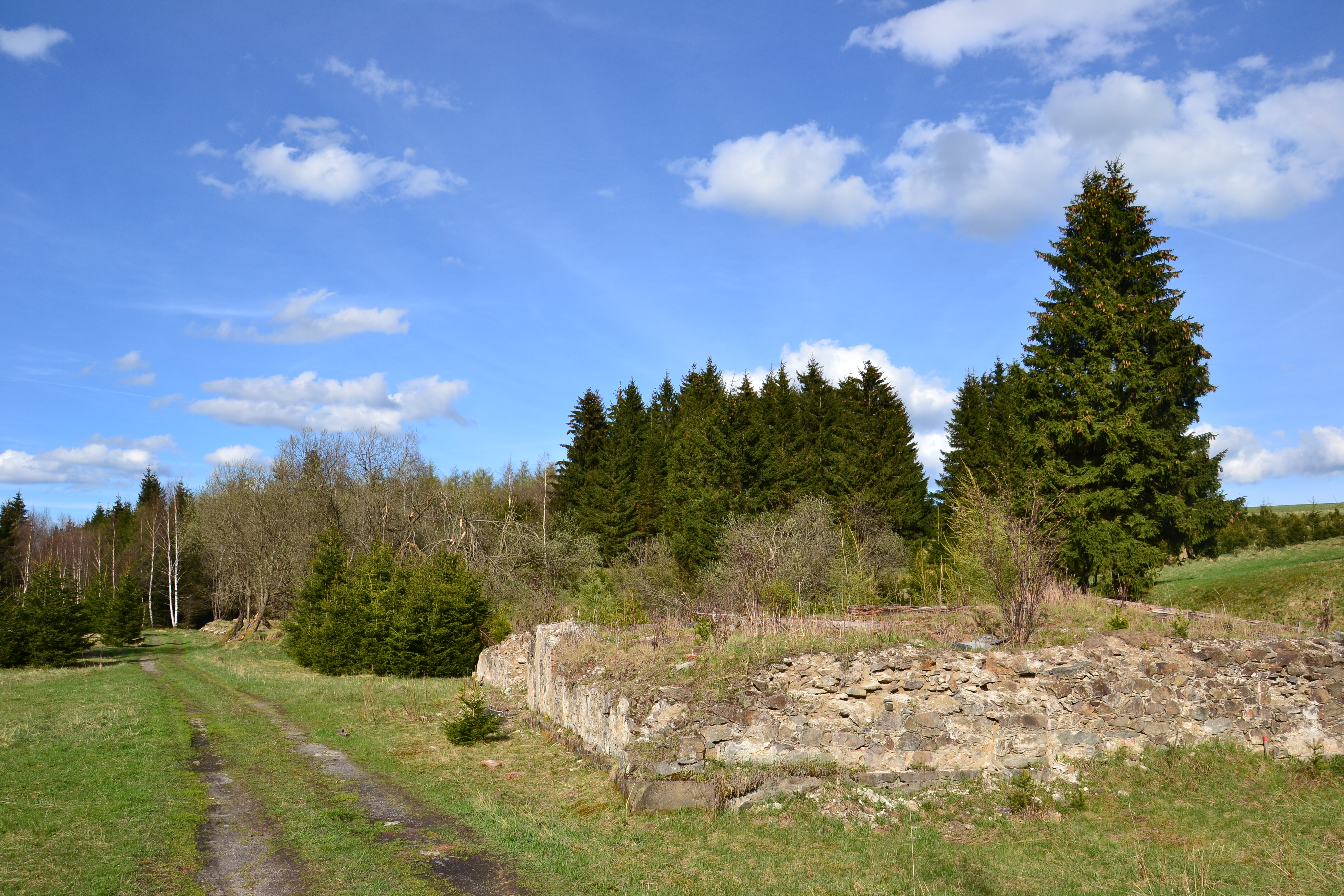 Pozůstatky nádraží